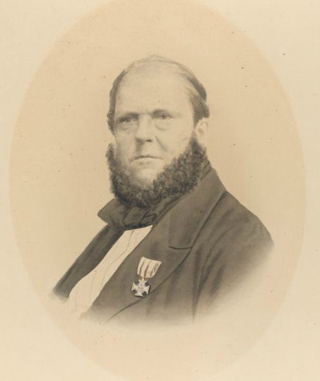 Dirk Zeper (1803-1881), burgemeester van Leeuwarden